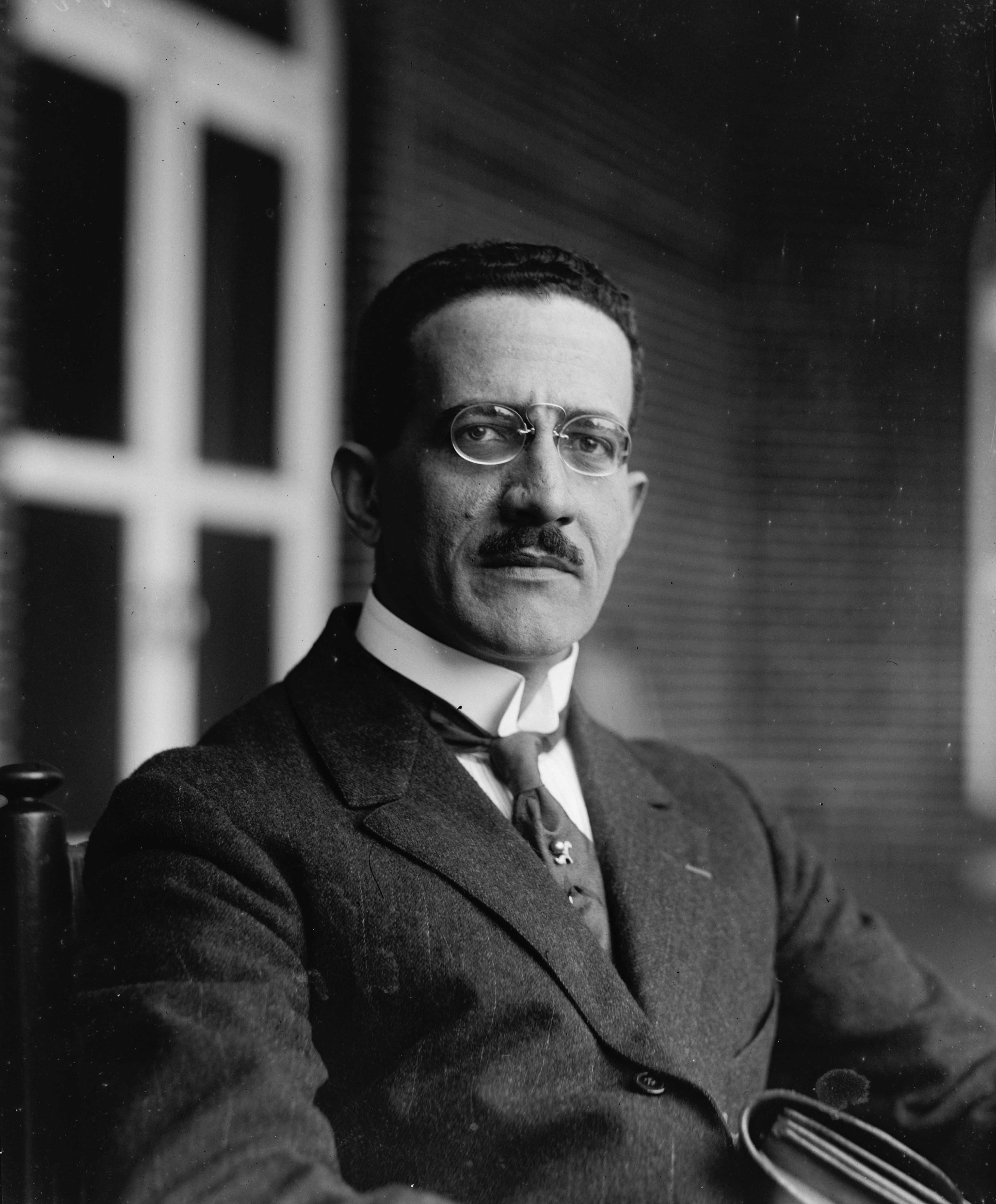 Ricardo J. Alfaro (1882-1971), President of Panama